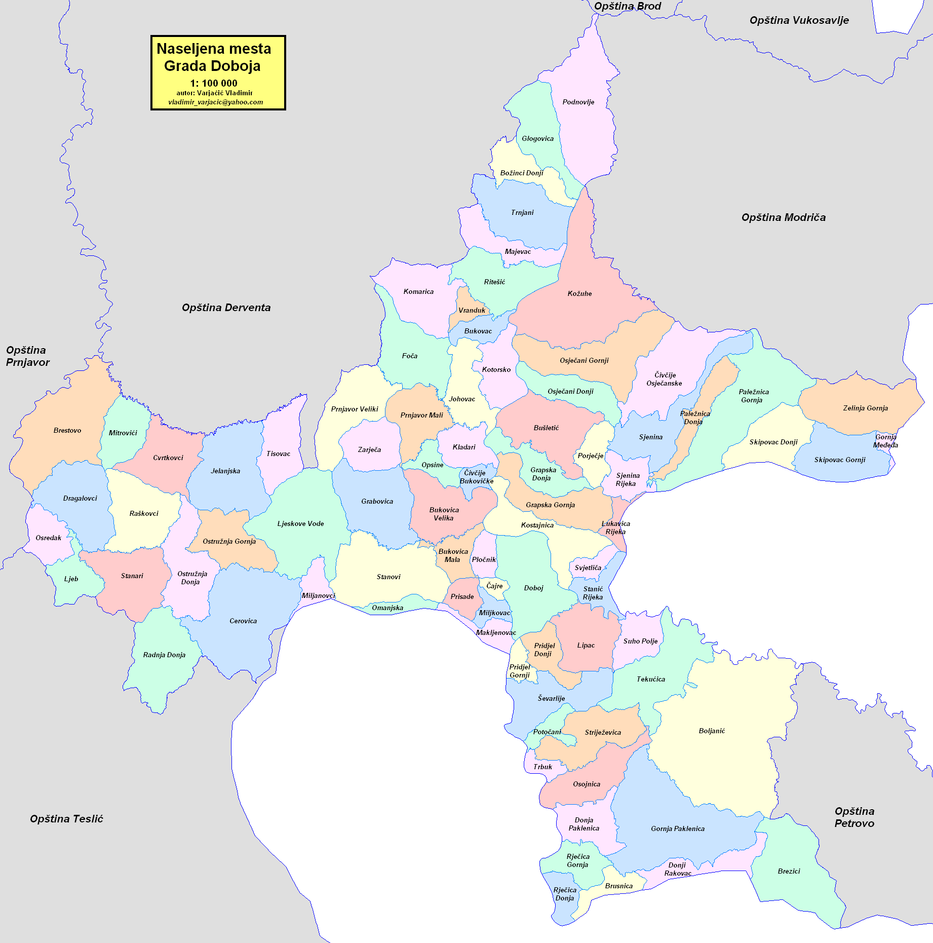 Opština Doboj